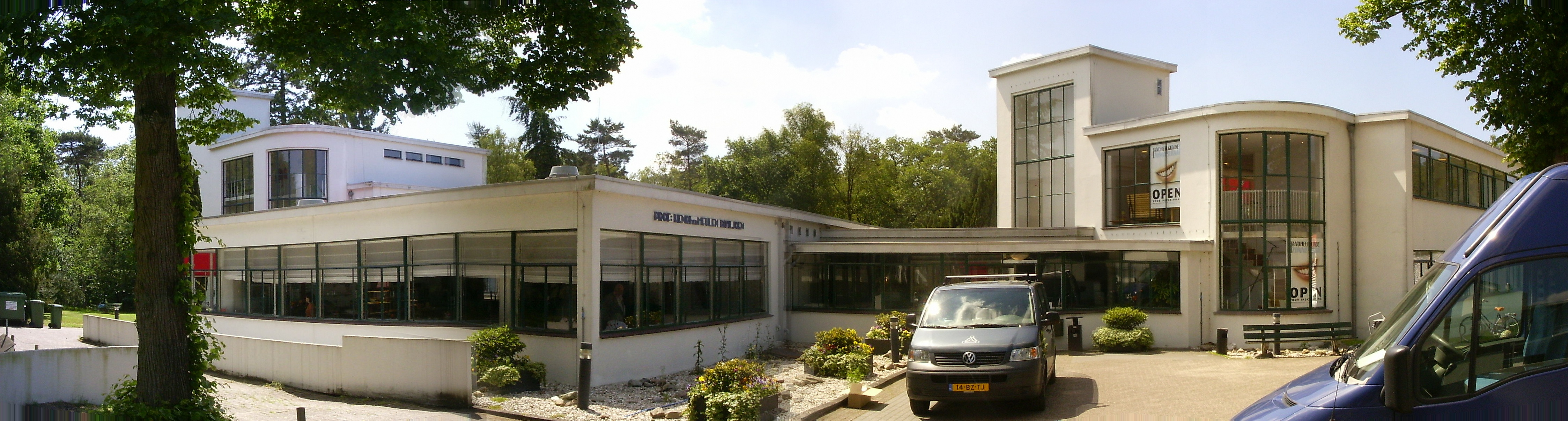 Ter Meulenpaviljoen Sanatorium Zonnestraal